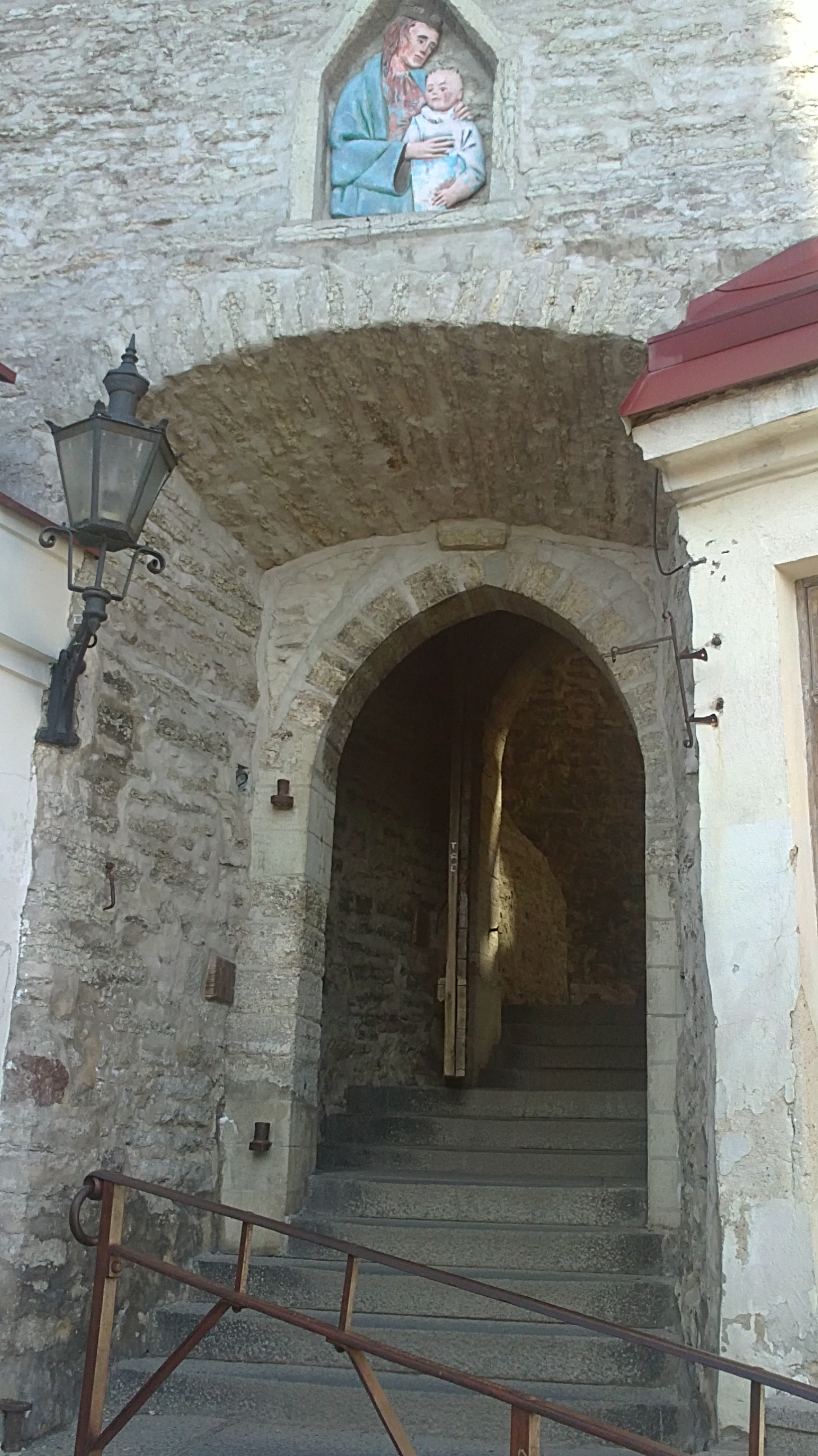 Tallinna linnamüüri, Lühikese jala jalgvärav, vaade Lühikeselt jalalt